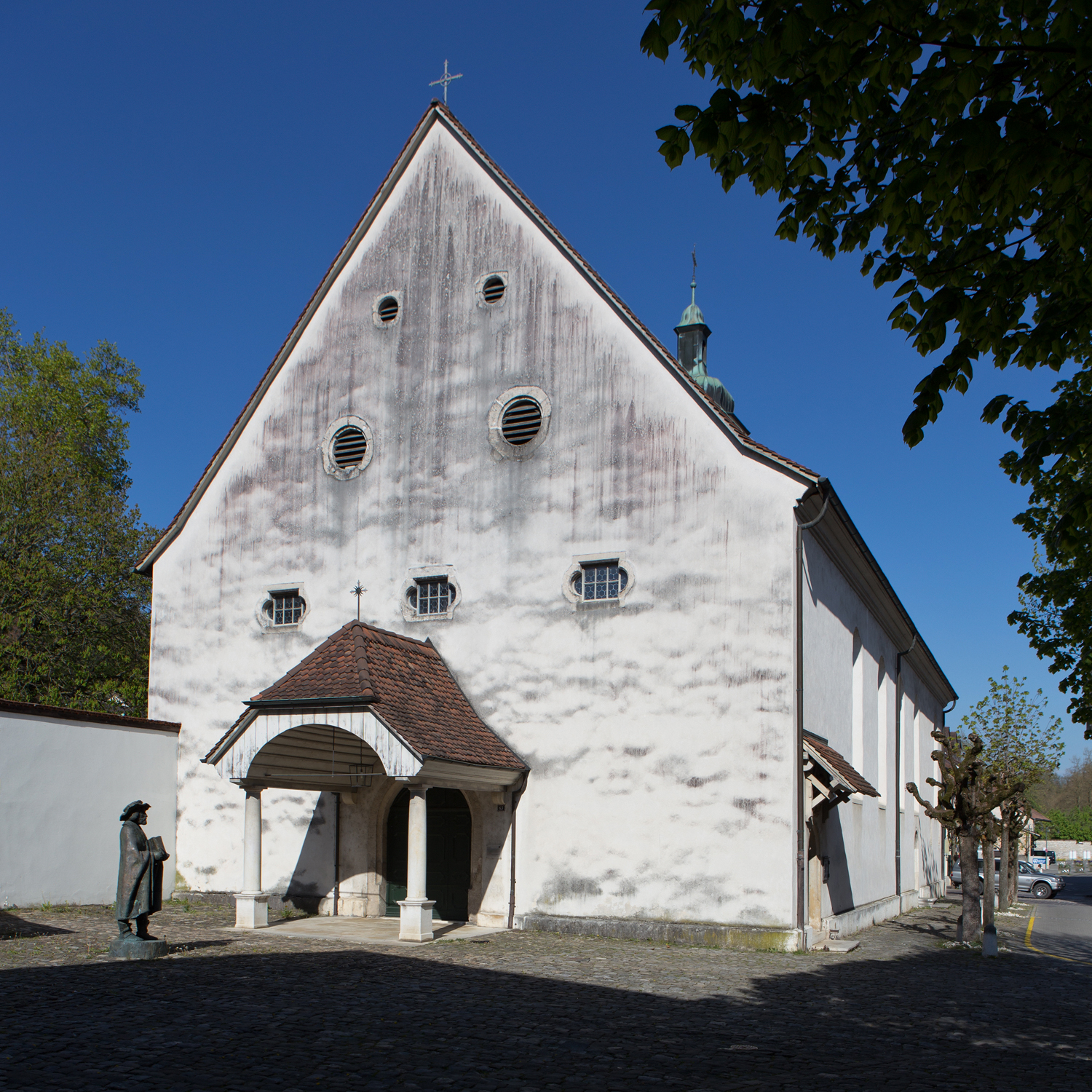 Katharinenkirche mit Statue des Helias Helye in Laufen (BL)